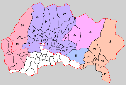 福島県耶麻郡の町村。